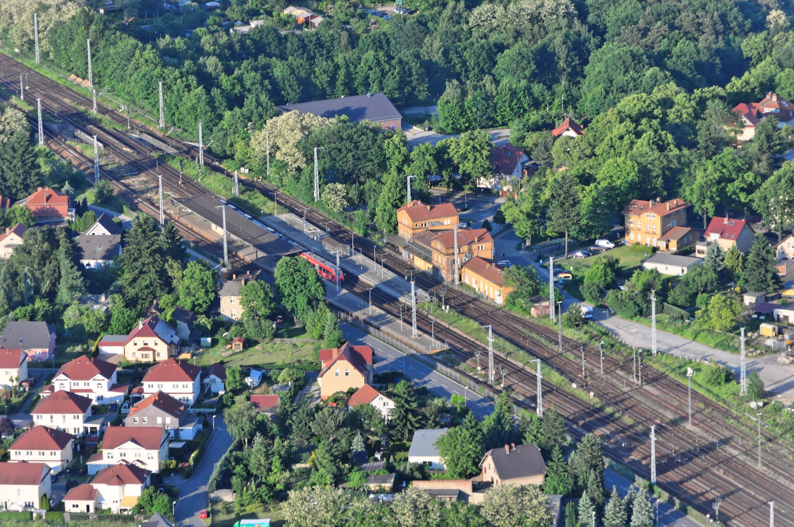 Überführungsflug vom Flugplatz Nordholz-Spieka über Lüneburg, Potsdam zum Flugplatz Schwarzheide-Schipkau. Bahnhof Michendorf.